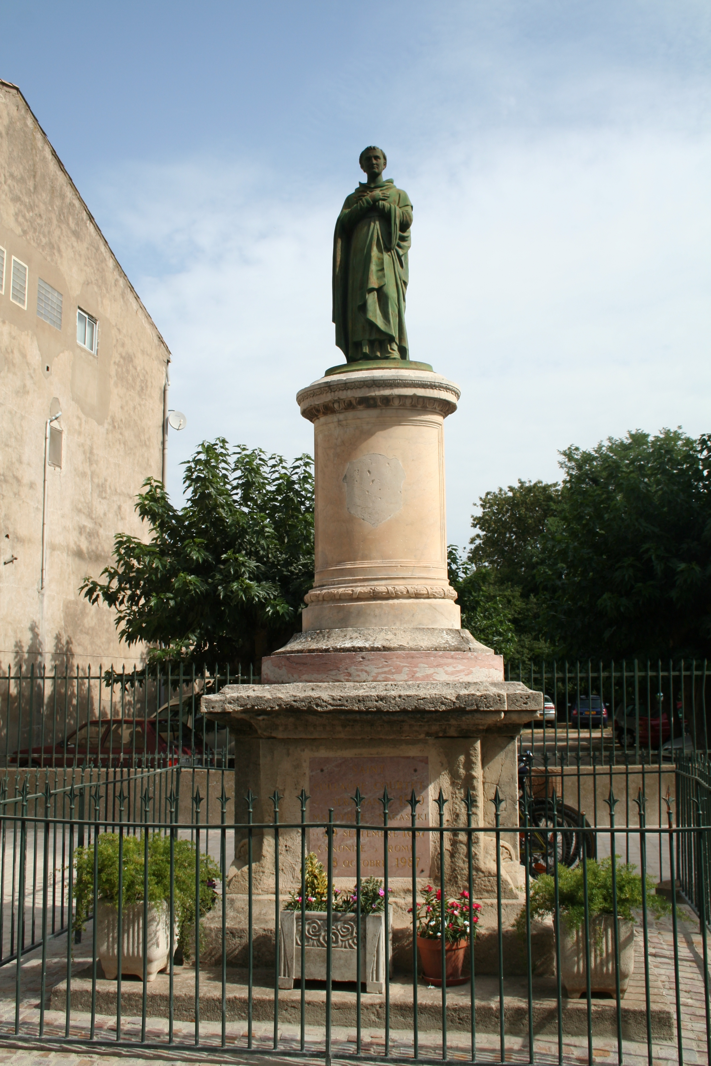 Sérignan (Hérault) - Statue (érigée en 1894) de Saint Guillaume Courtet (1590-1637)